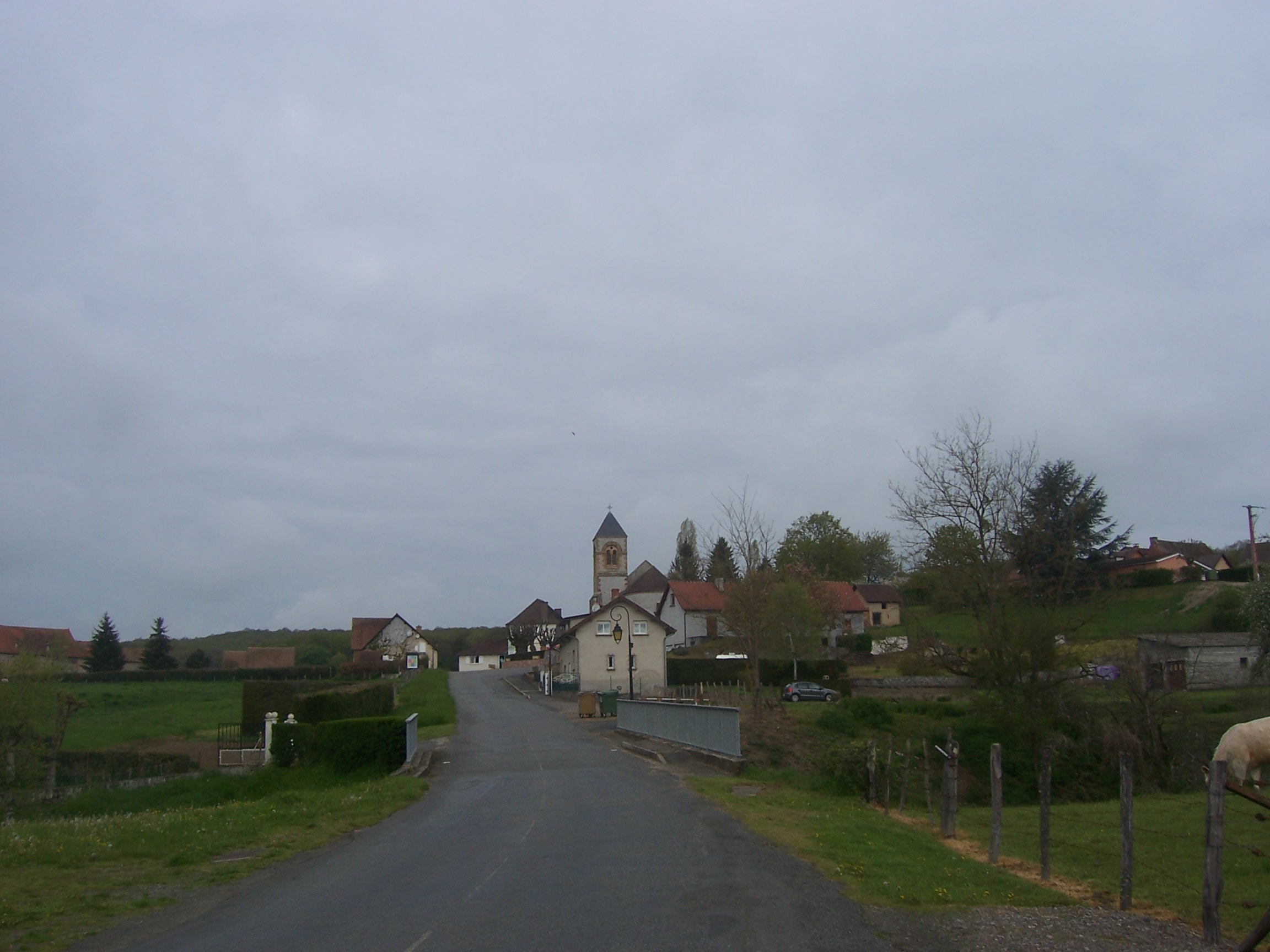 Perrigny-sur-Loire